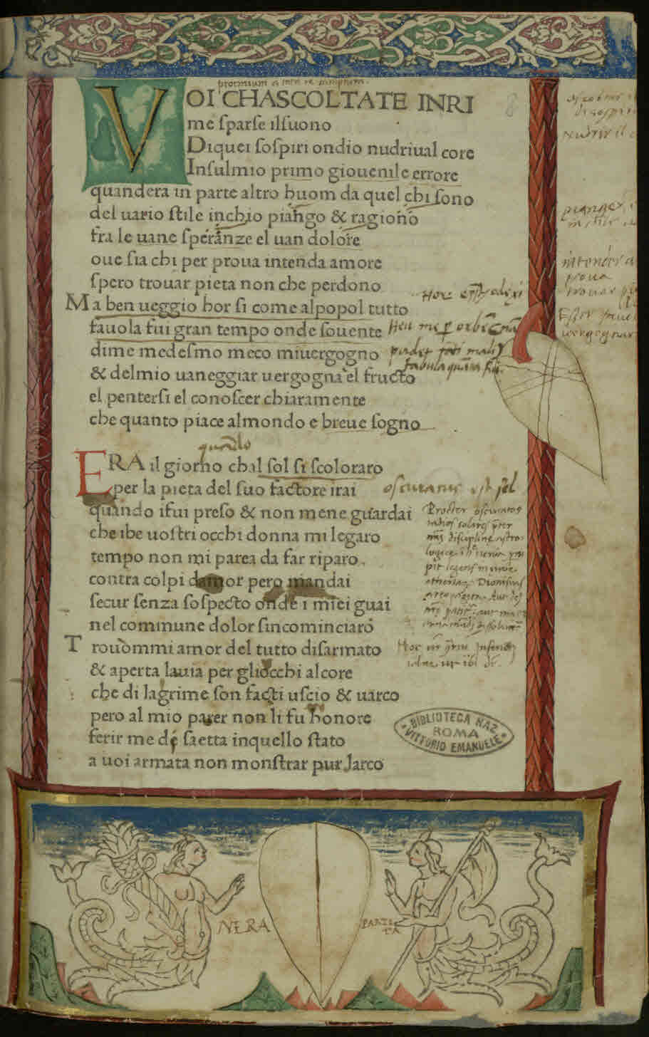 Canzoniere. Segue: Trionfi. - [Venezia] : Vindelinus, MCCCCLXX. - 180 c. ; [a-b⁸, c-o¹⁰, p⁶, q-s¹⁰, t⁸] ; 4°. - Manca la c. [a]1 .